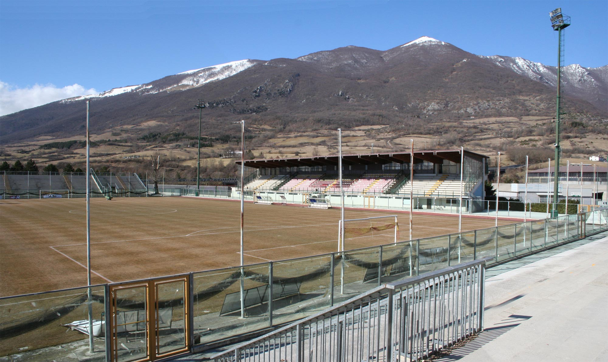 Foto dello stadio T. Patini di Castel di Sangro dall'interno (Photo from the inside of the T. Patini di Castel di Sangro stadium)